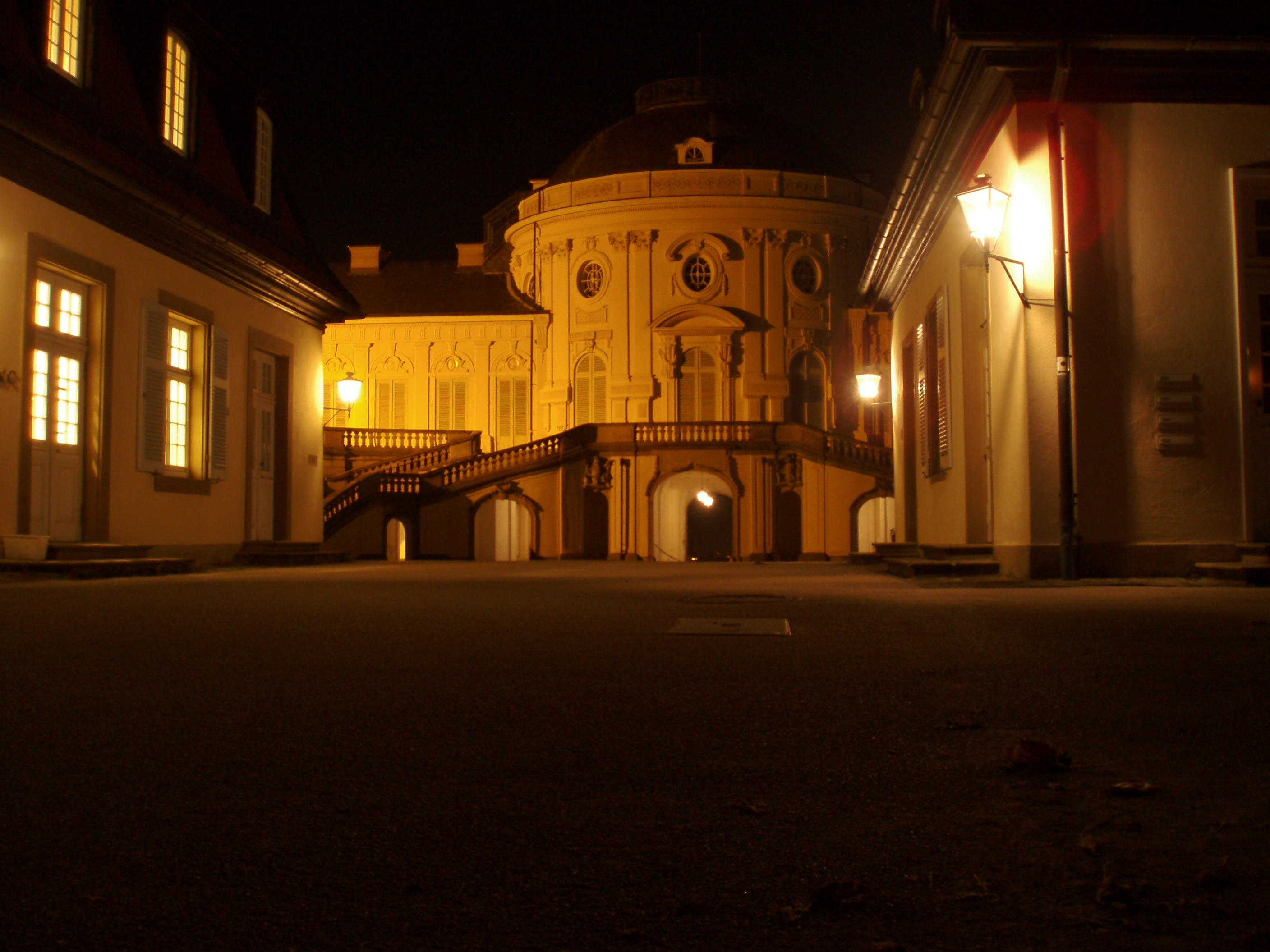 Das Photo zeigt die Ansicht von Schloss Solitude zwischen den beiden Kavaliersbauten bei Nacht.